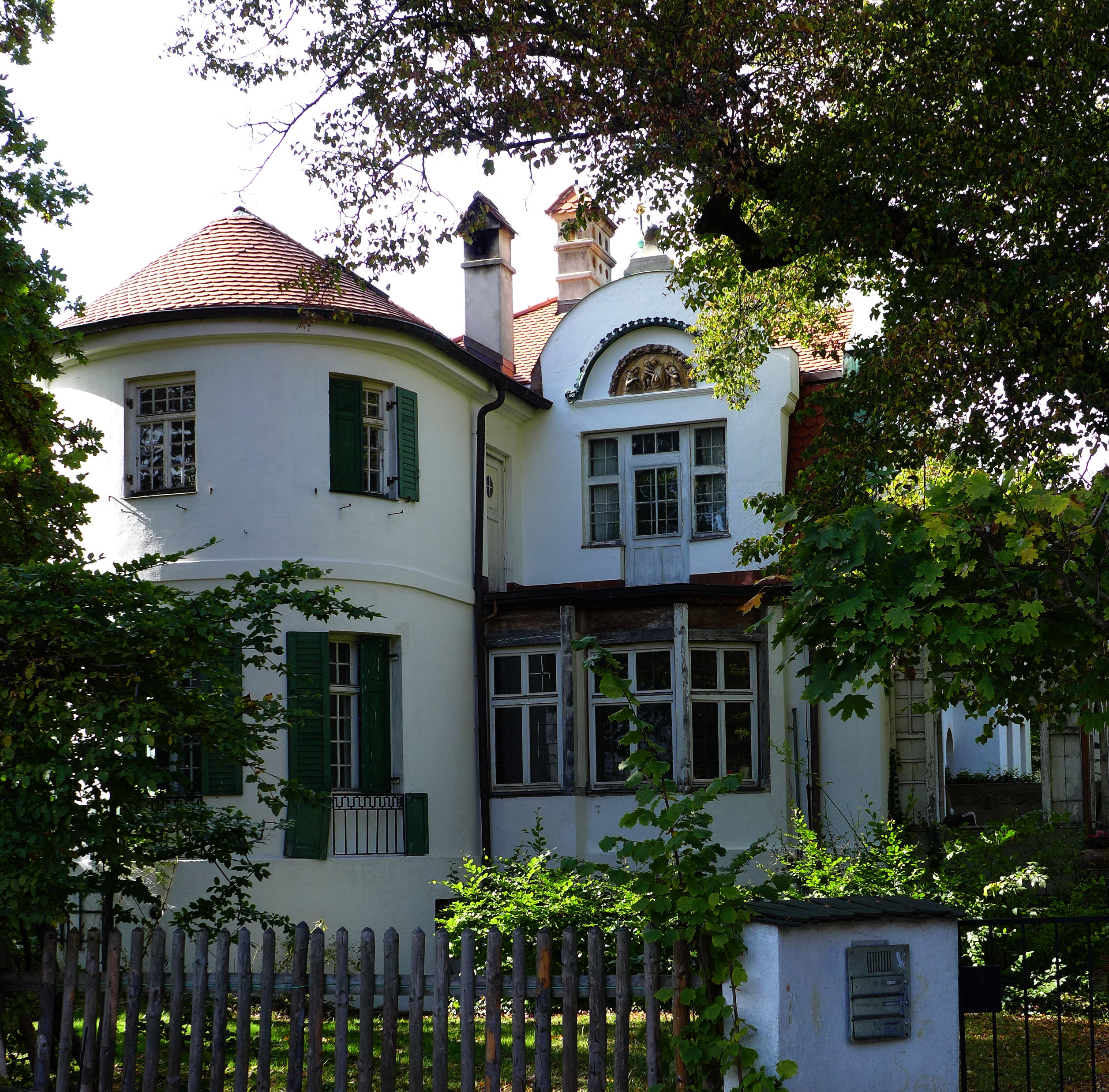 Floßmannstr 37,München